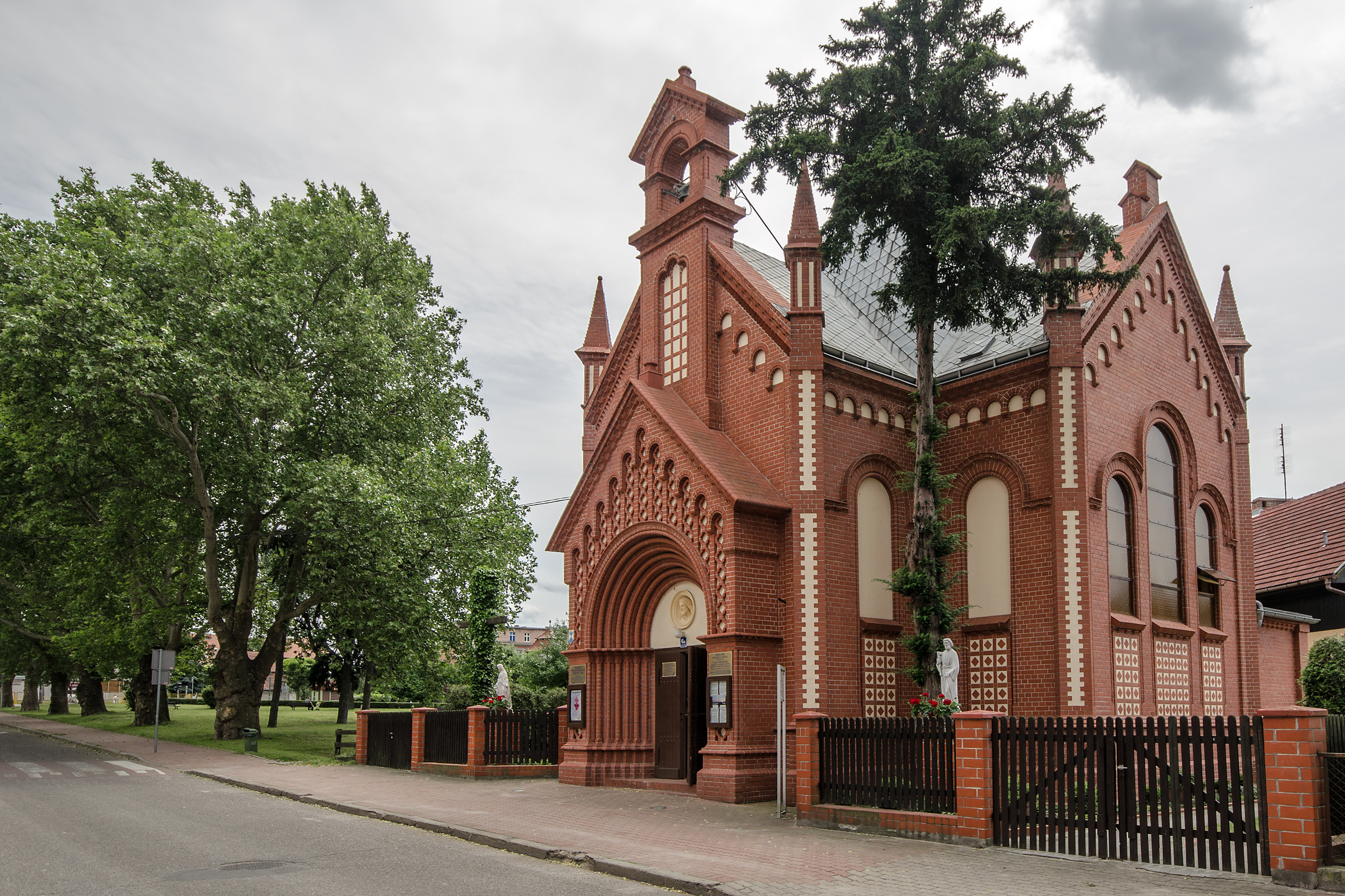 Żagań, kaplica staroluterańska, ob. kościół polsko-kat. p.w. Podwyższenia Krzyża Św., 1902